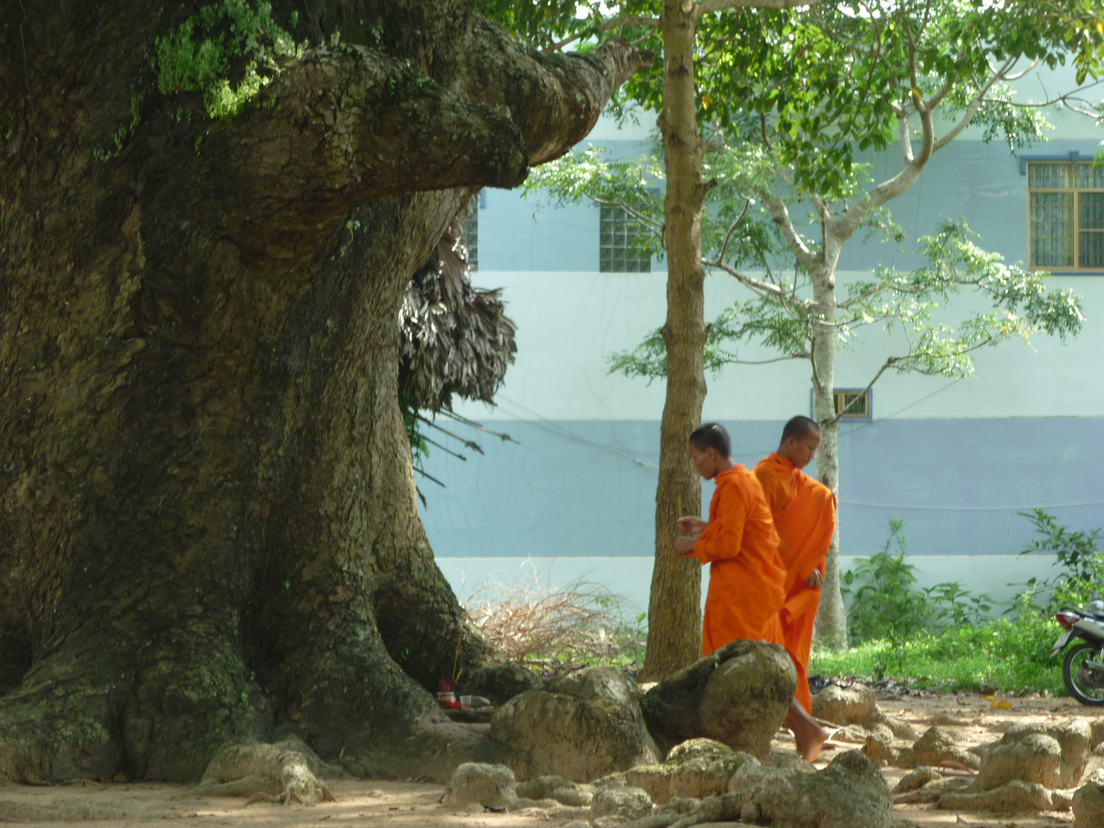 Cây Thần Linh ngàn tuổi của Việt Nam...